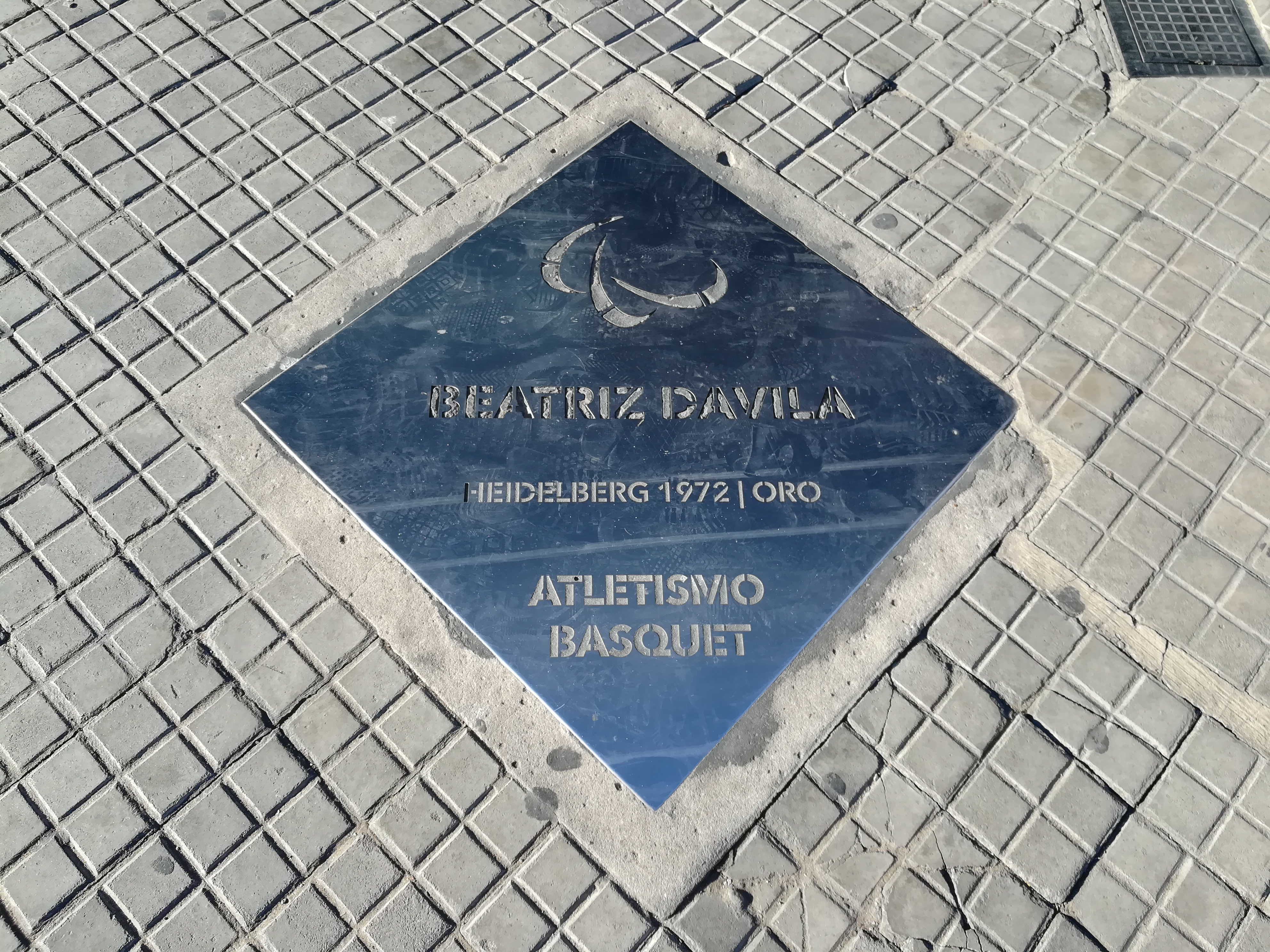 Paseo de los Olímpicos de los en la Avenida Pellegrini (Rosario).